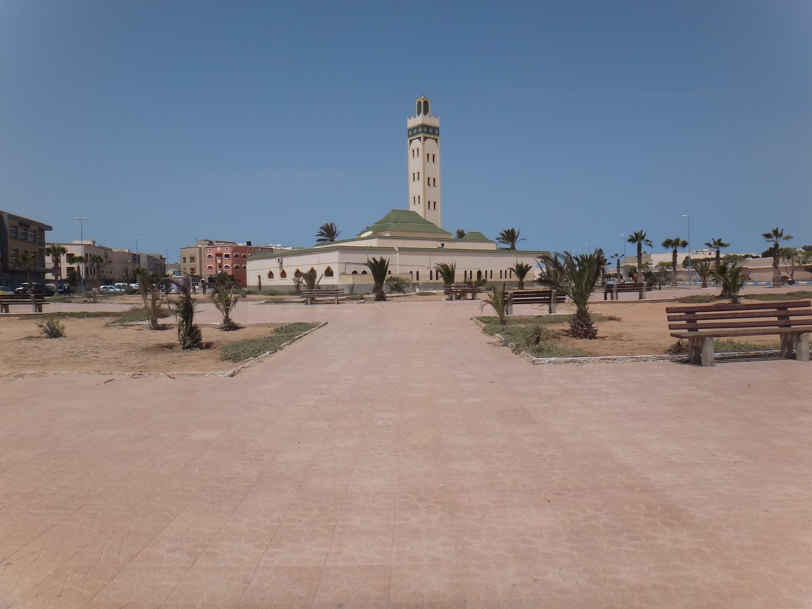 文言: 達克拉的清真寺